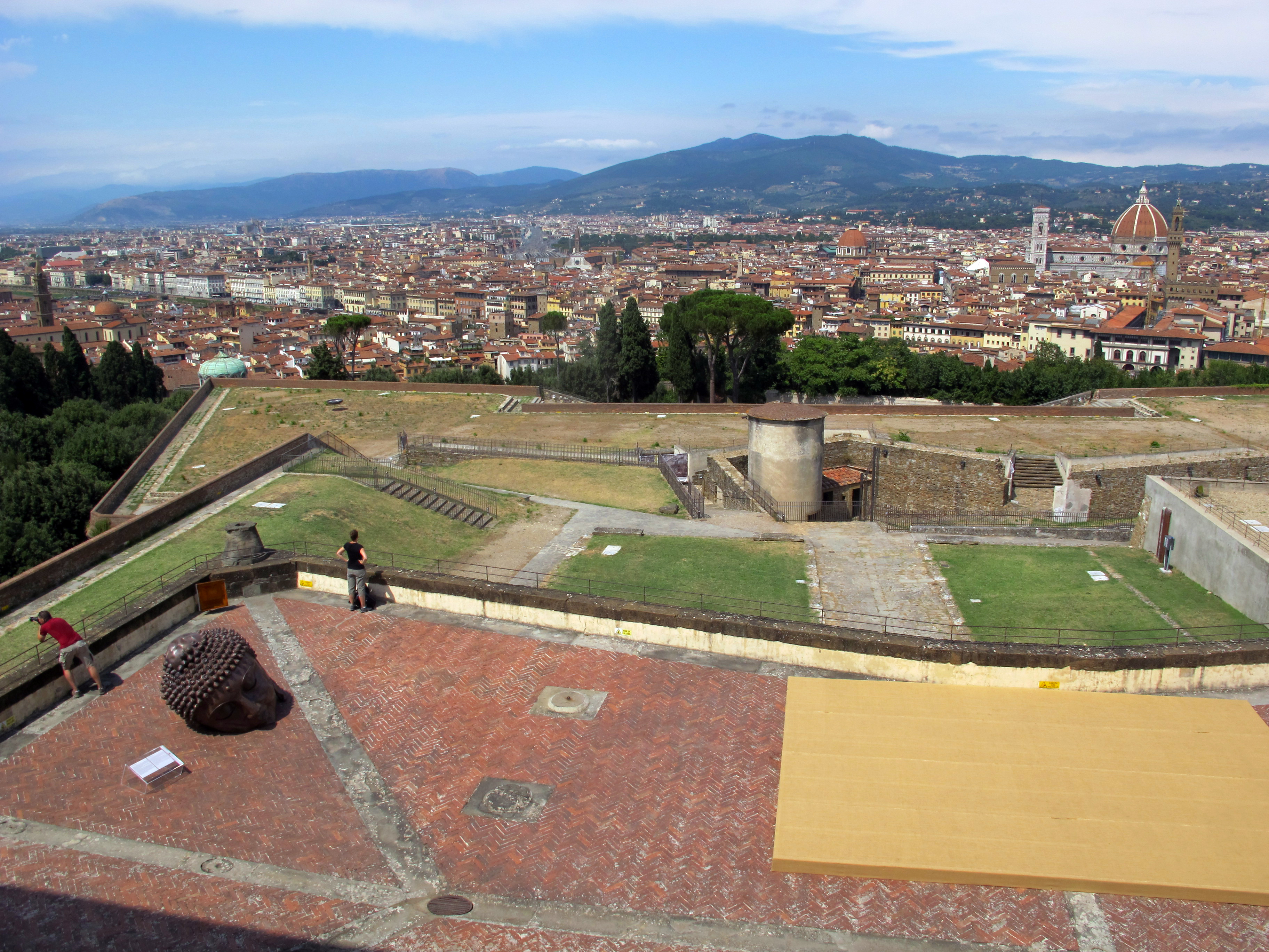 View from Forte Belvedere, Florence